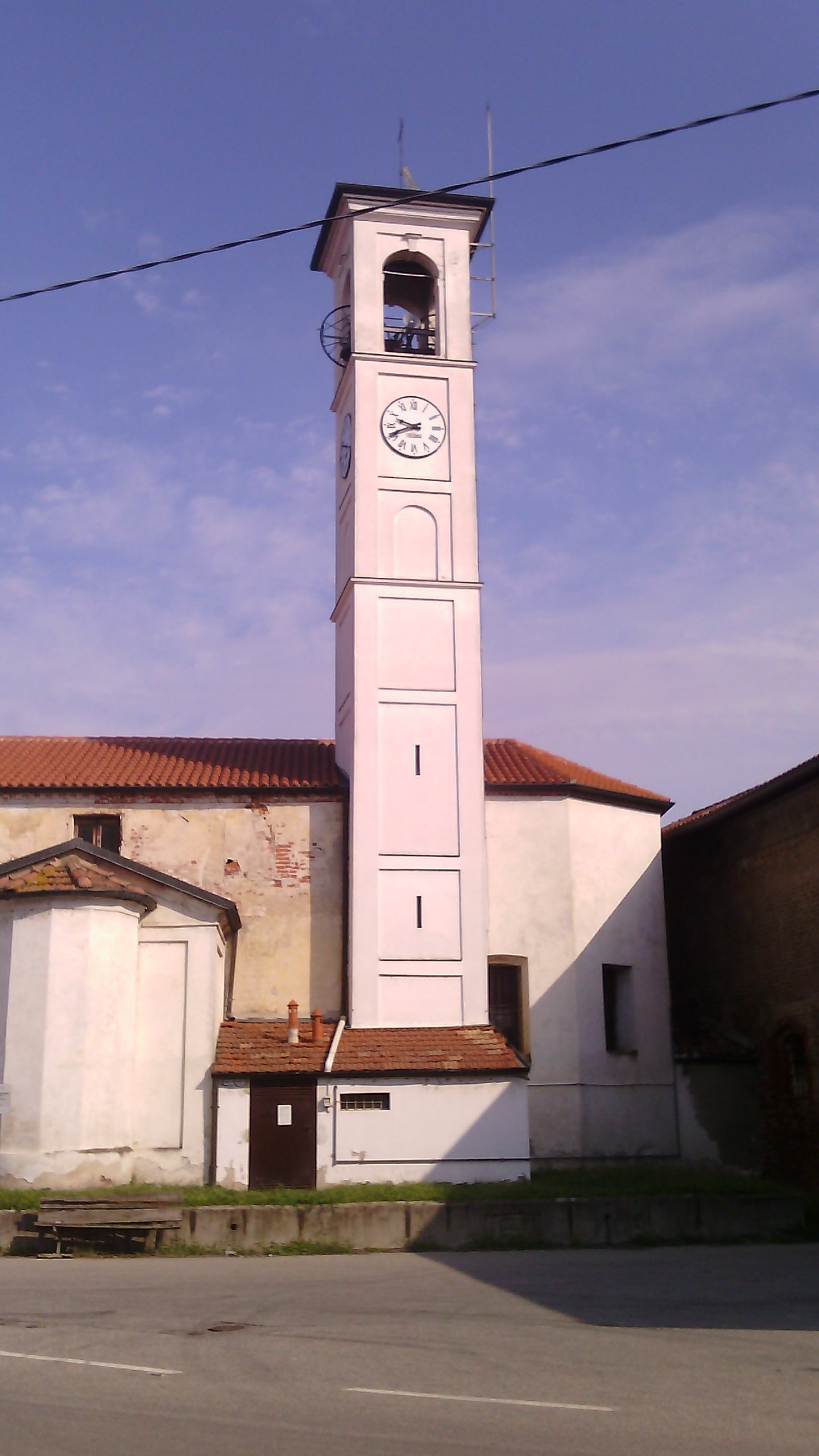 Campanile della chiesa parrocchiale di Fagnano, Gaggiano (MI)